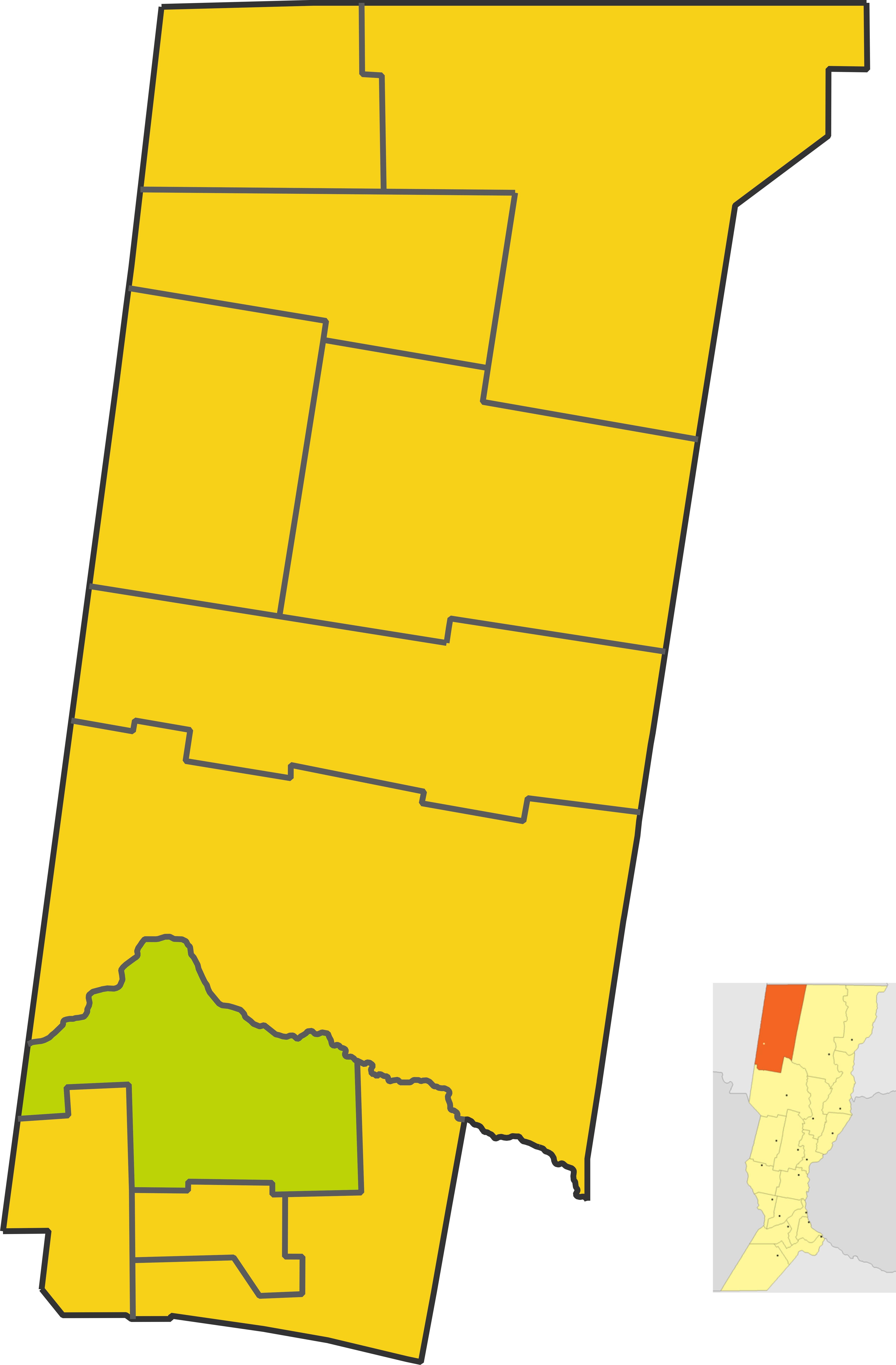 Map of the comuna de Logroño in Nueve de Julio department, Santa Fe province, Argentina